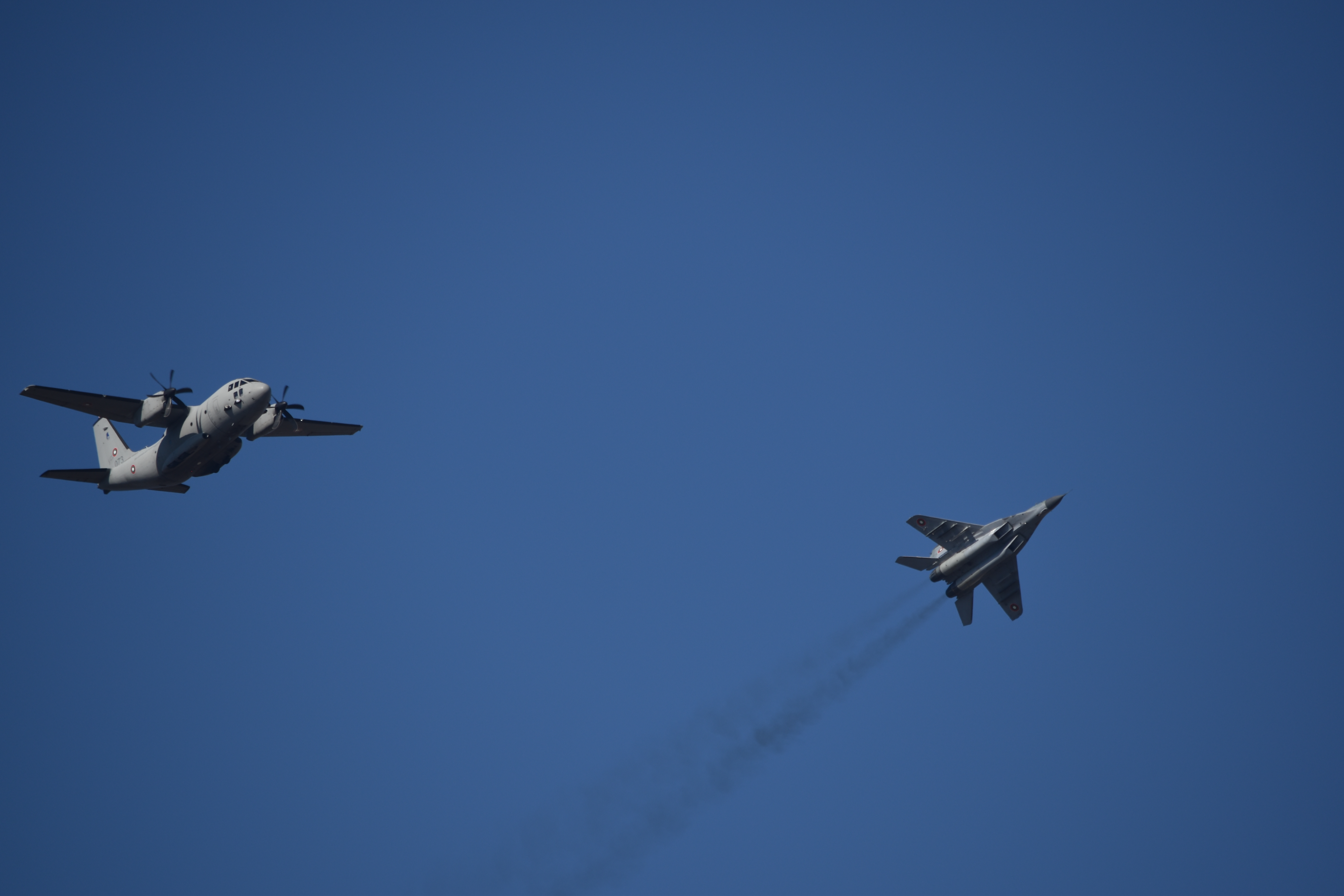 Многоцелев изтребител МиГ-29 и военнотранспортен самолет Alenia C-27J Spartan от състава на българските ВВС по време на демонстрация на т. нар. "еър полисинг", авиобаза Граф Игнатиево, 9 октомври 2018 г.